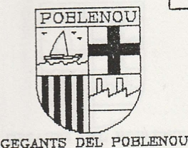 Fotografia de l'escut dels gegants del Poblenou l'any 1995